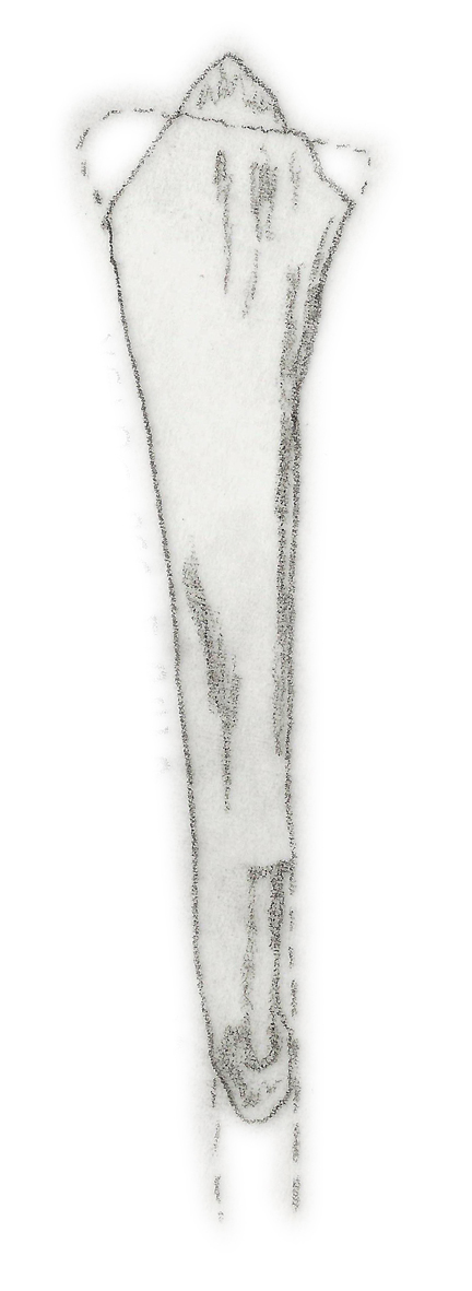 Illustration of a fossil of Velocipes